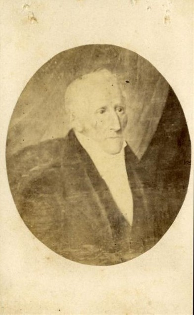 Reporducción fotográfica de un retrato pictórico que muestra al que fuera en el año 1813, Director Supremo de las Provincias Unidas, en su ancianidad.